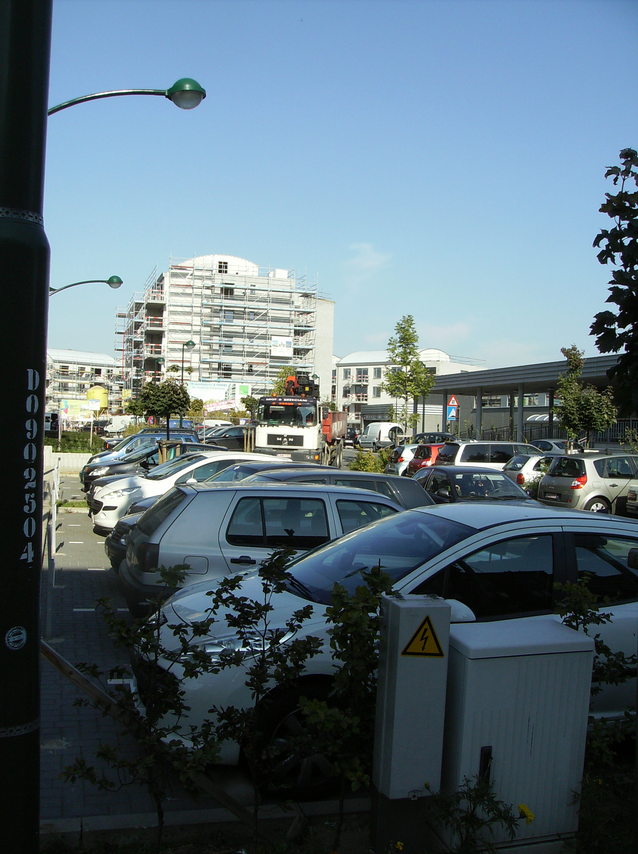 clos Lucien Outers Auderghem